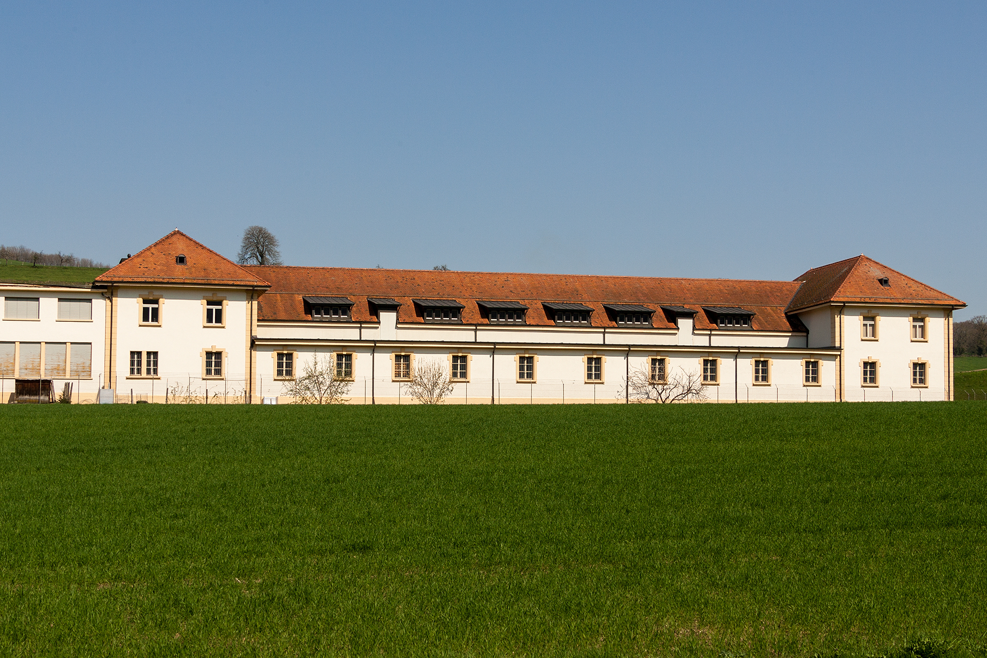 Zeughaus von Moudon (VD)